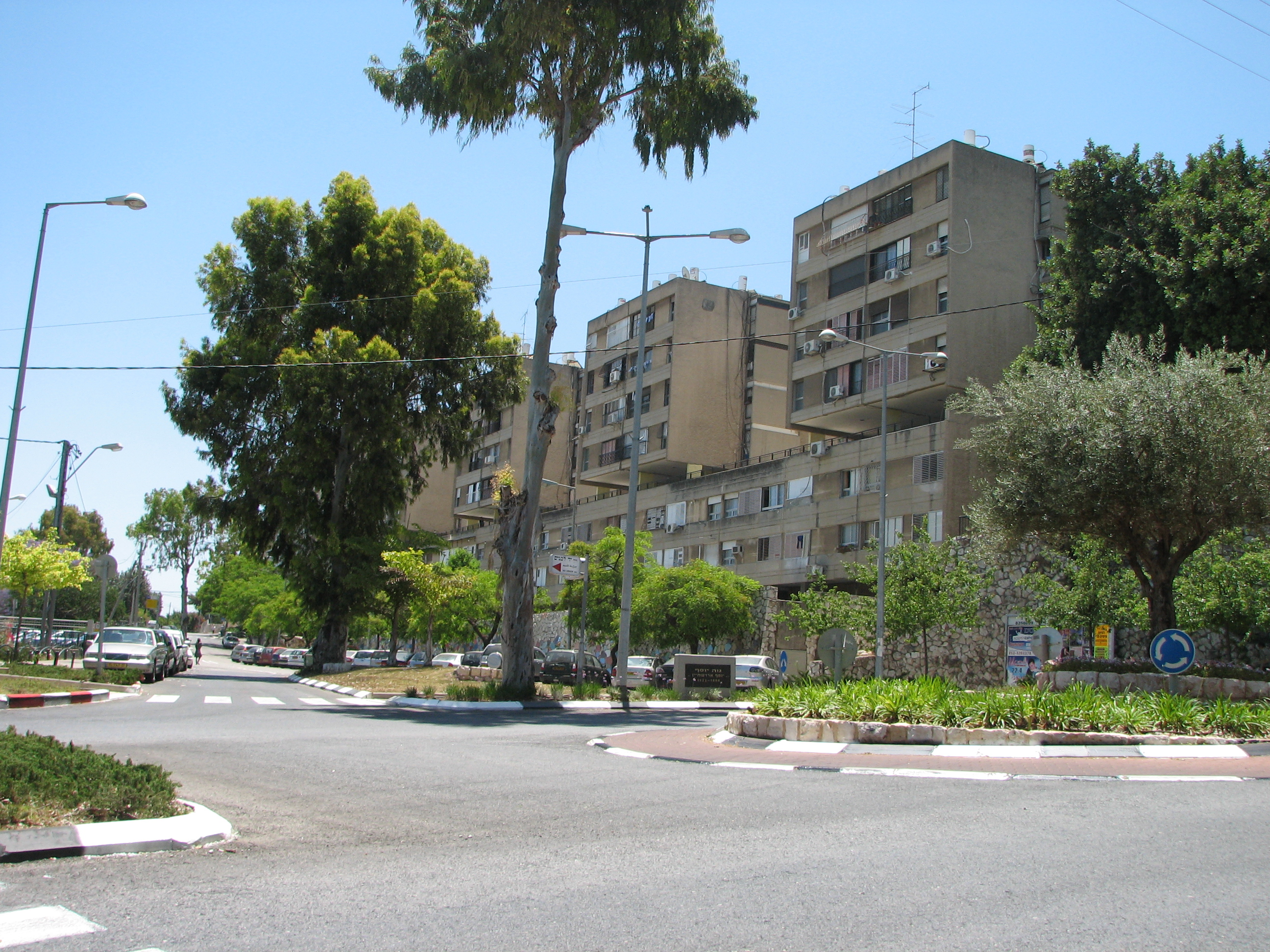 Neve Yosef, Neighborhood in Haifa. נוה יוסף היא שכונה זו, הקרויה על שמו של יוסף ארדשטיין. השכונה שוכנת במורדות הצפוניים של נווה שאנן. הוקמה בשנת 1949 הכניסה לשכונת נוה יוסף, בסיבו דרך יד לבנים והצומת עם רחוב ערד